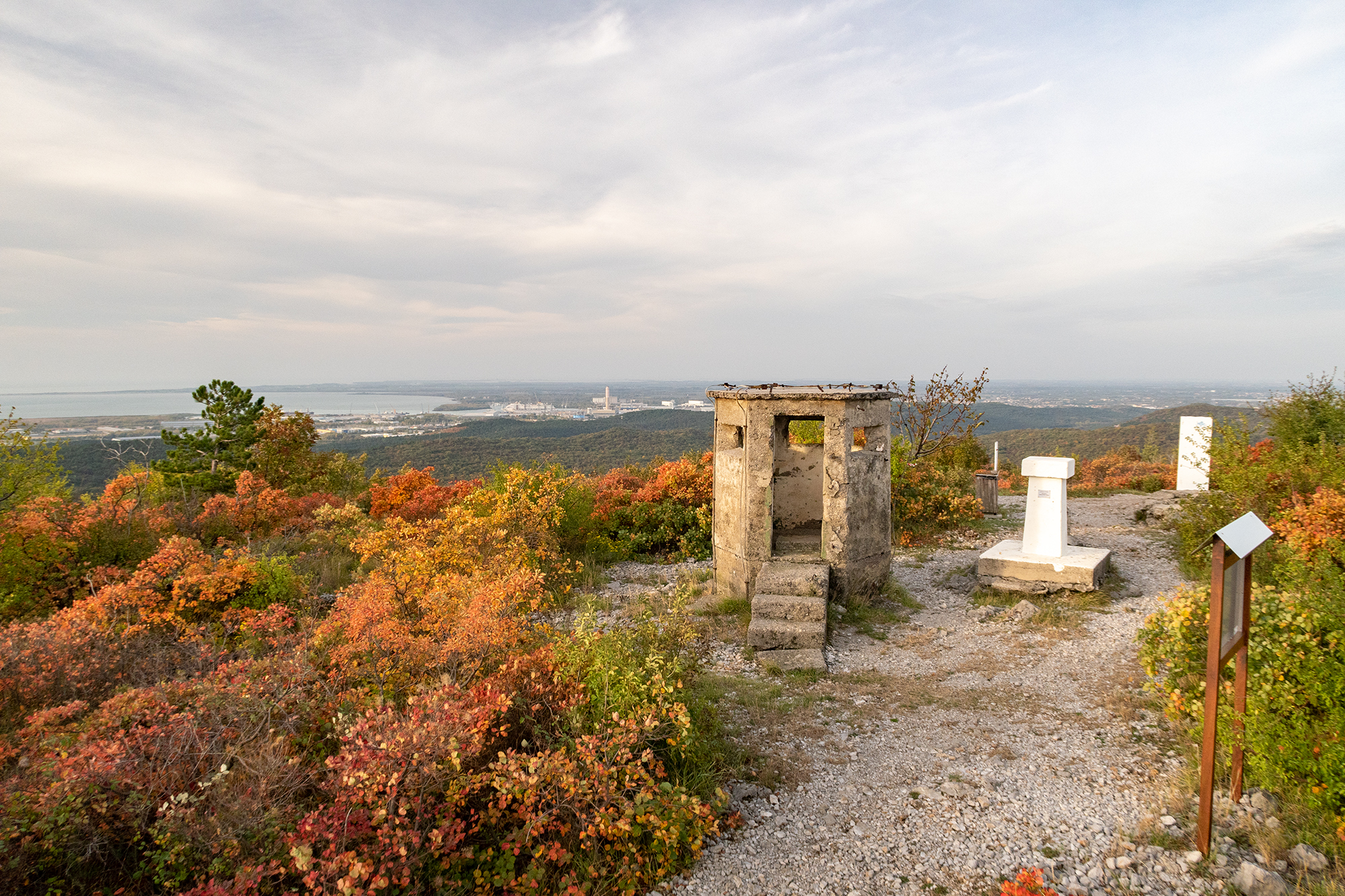 Kremenjak vrh z mejnim kamnom